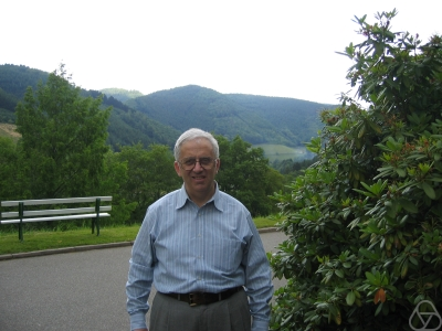 Grigorji Margulis